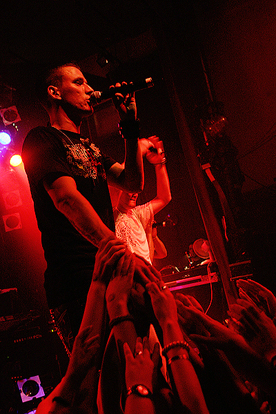 Rapsoul live in Hamburg "Unbeschreiblich-Tour" , Jan Fräger